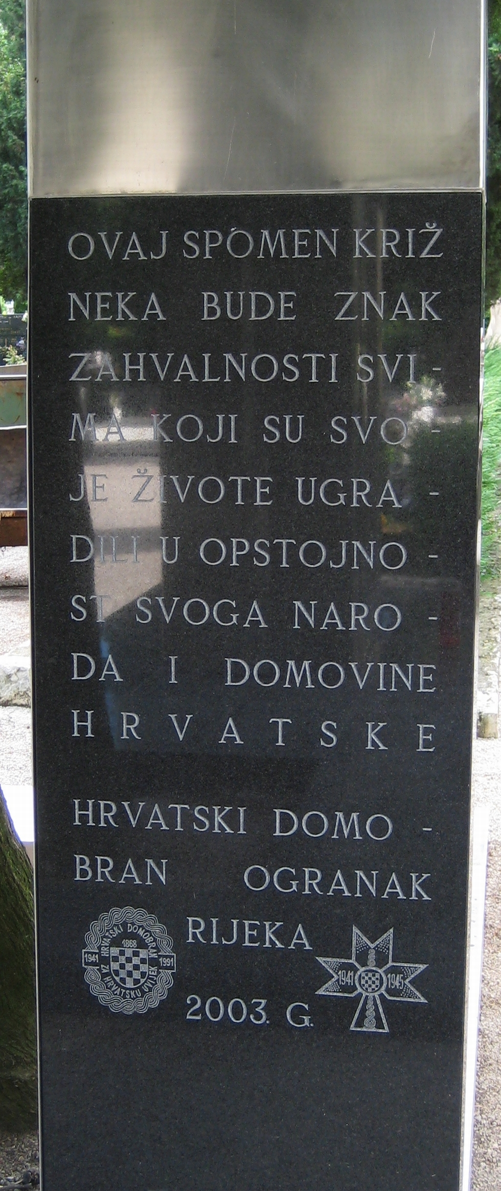 Spomenik hrvatskim domobranima na groblju Trsat